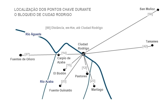 Zona de acção do Combate de El-Bodón a 25 de setembro de 1811.